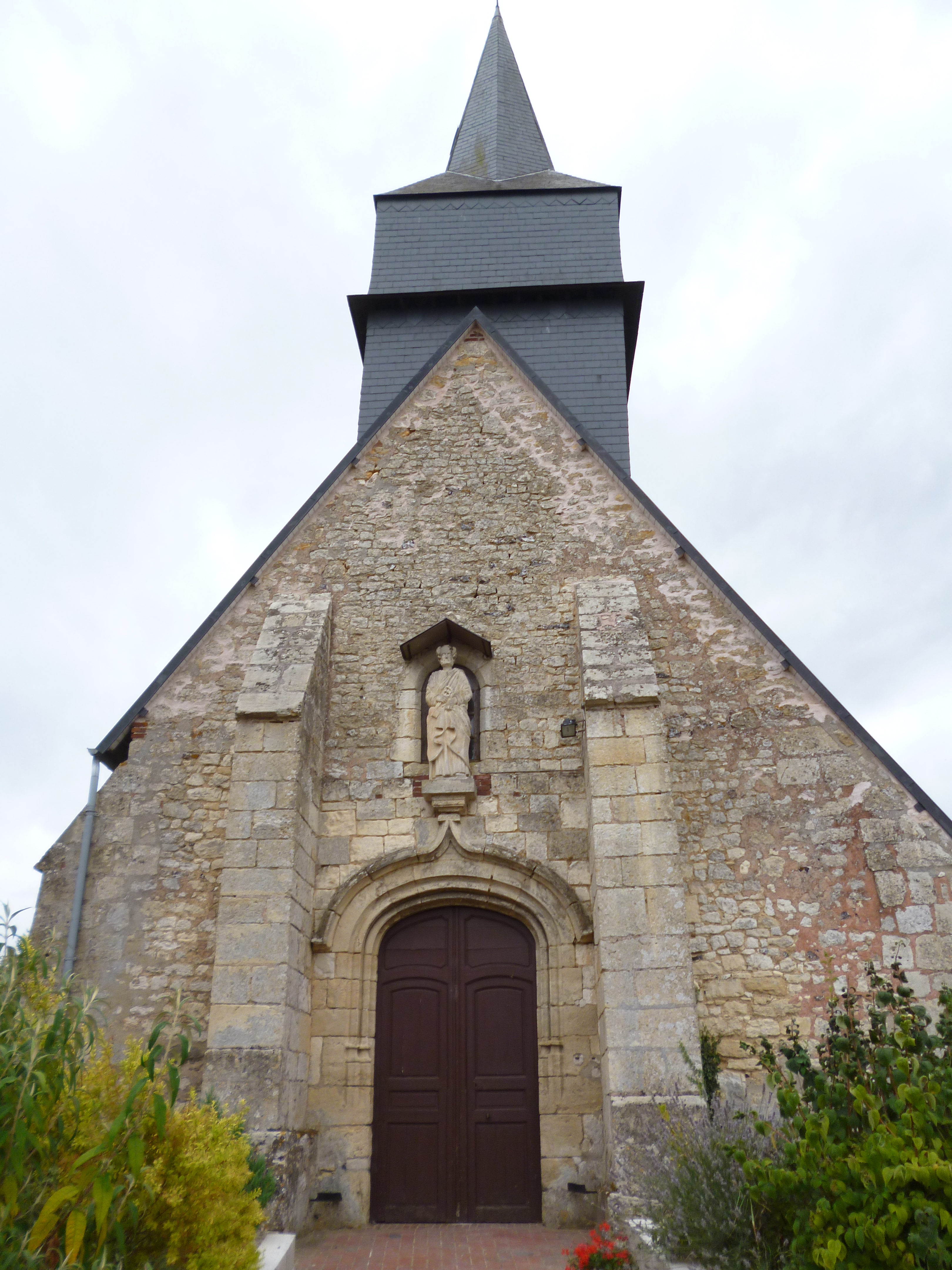 L'église Saint-Pierre de Bucamps (Oise).